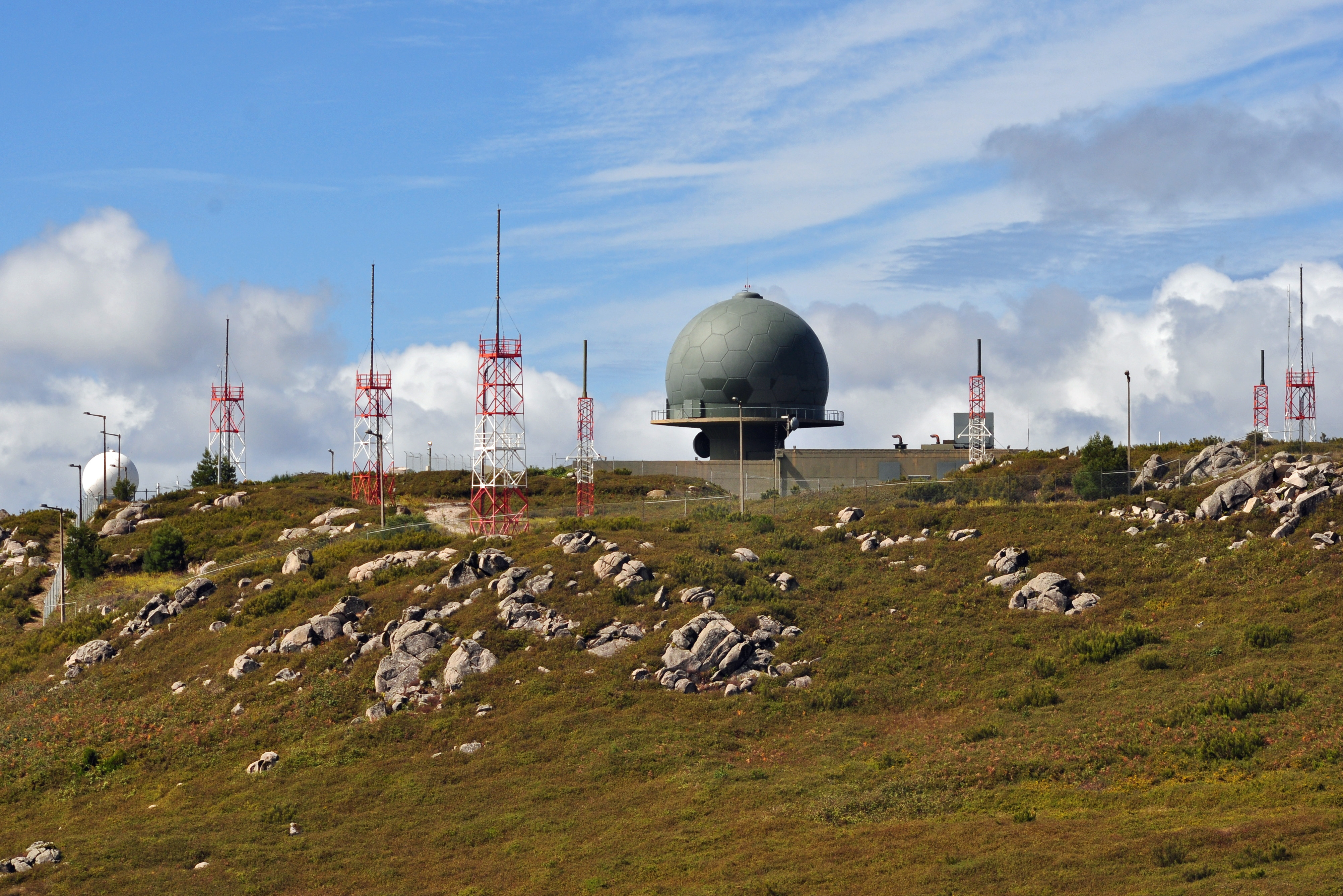 Fóia, auf dem Berg (2012-09-26), by Klugschnacker in Wikipedia (6)